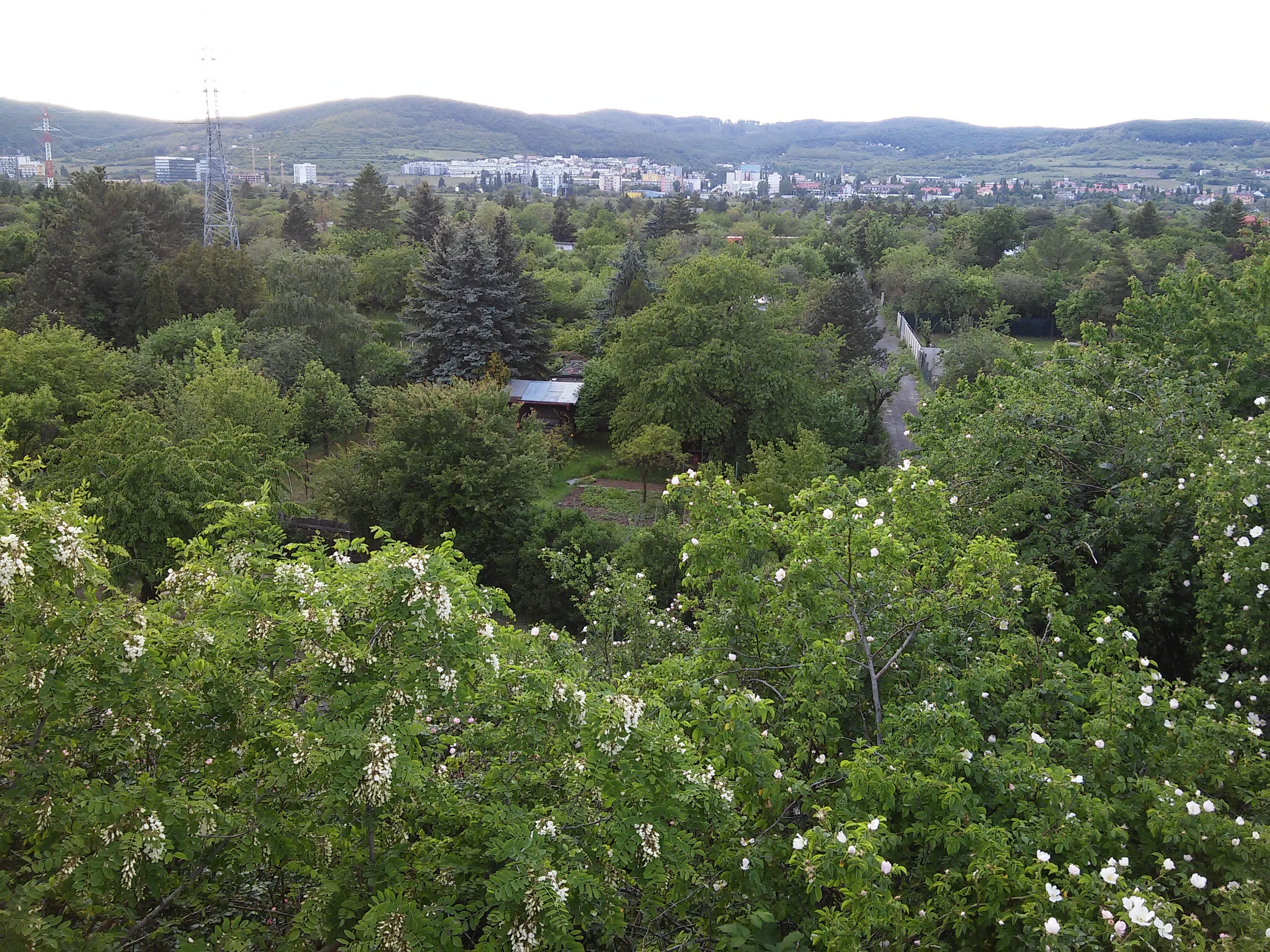 Žabí Majer, Bratislava - Rača